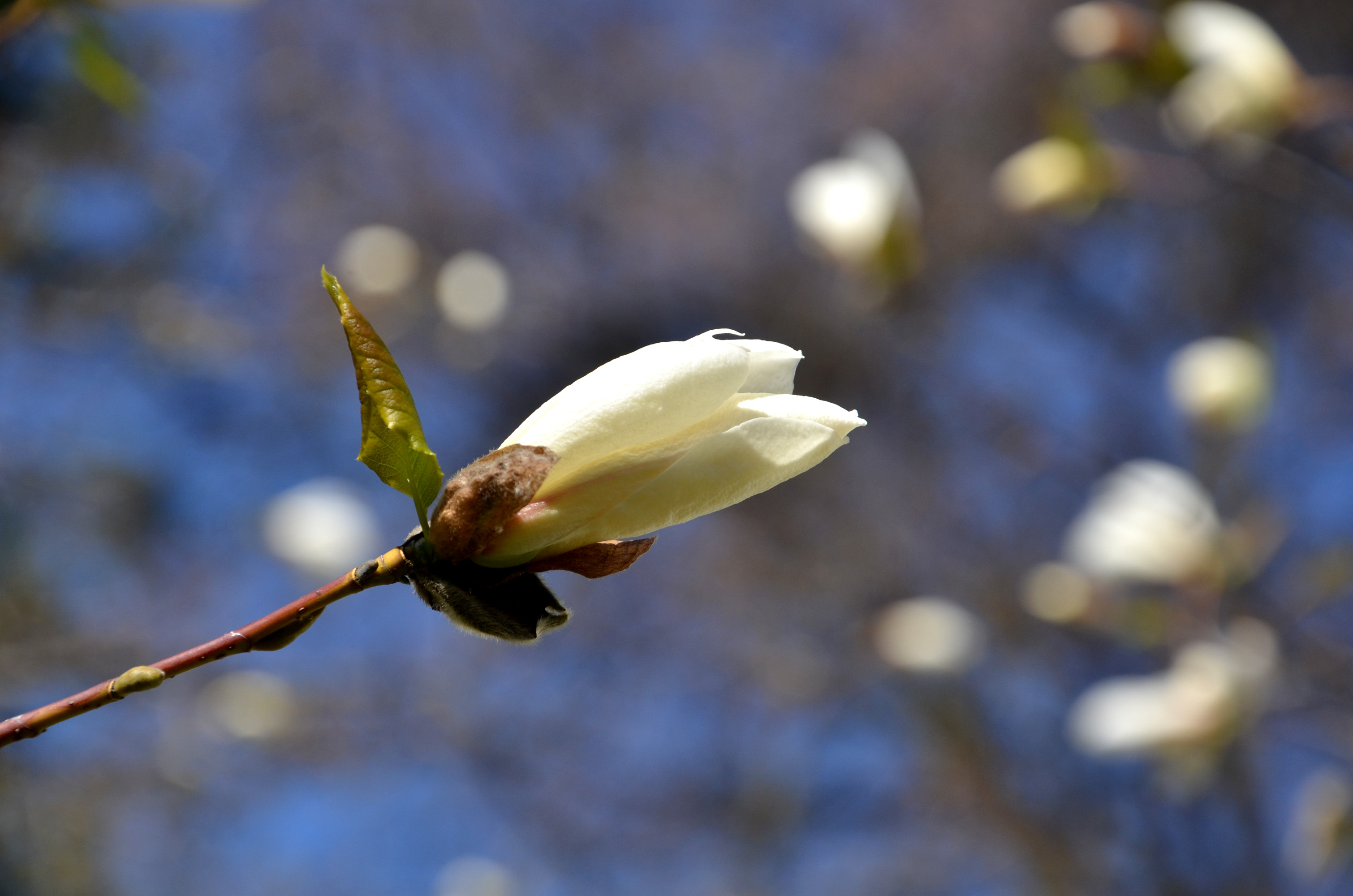 Весняний цвіт «Тернопільських магнолій».